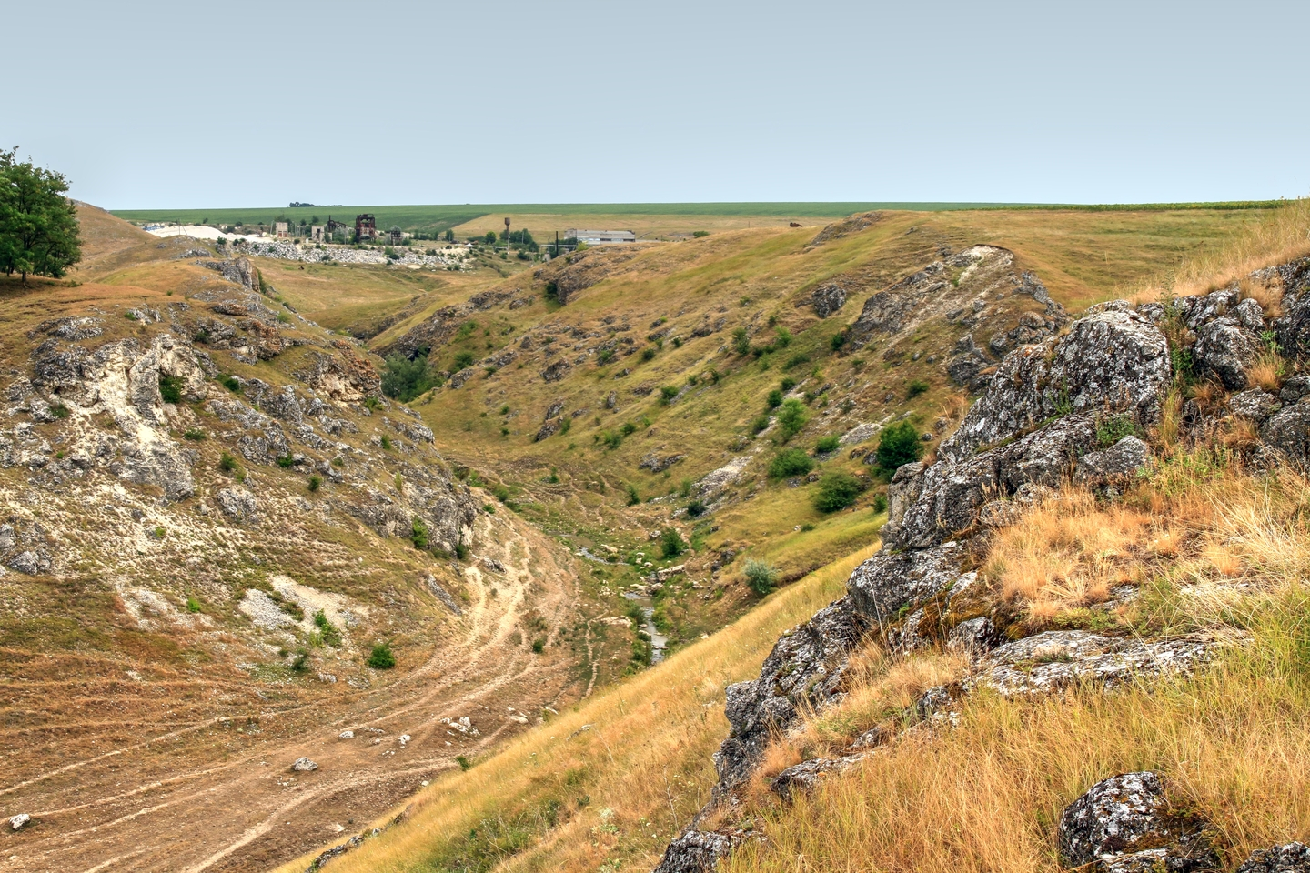 Вэратикское ущелье, монумент природы, находится в Рышканский район, Восточнее с. Вэратик (код MD-RS-mn.A-063) A-063